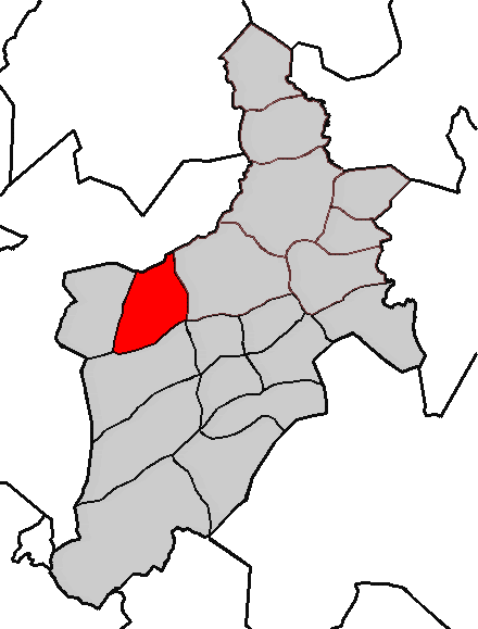 Situación da parroquia de Figueroa no concello de Abegondo